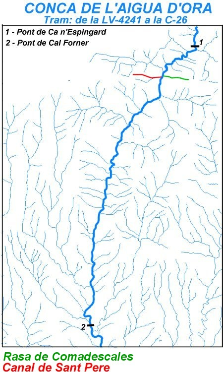 Mapa de la conca de l'Aigua d'Ora en el tram comprès entre la LV-4241 (pont de Ca n'Espingard) i la C-26 (pont de Cal Forner) en el qual s'hi han destacat la Rasa de Comadescales i la Canal de Sant Pere.